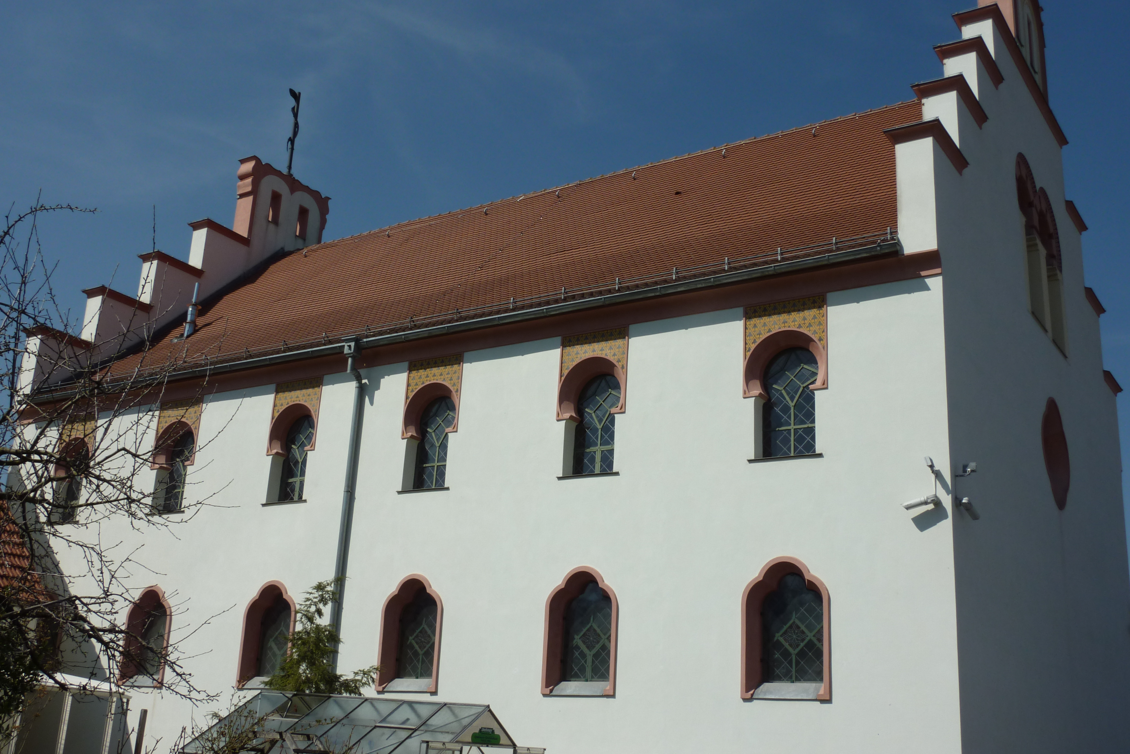 Synagoge in Binswangen, Südseite